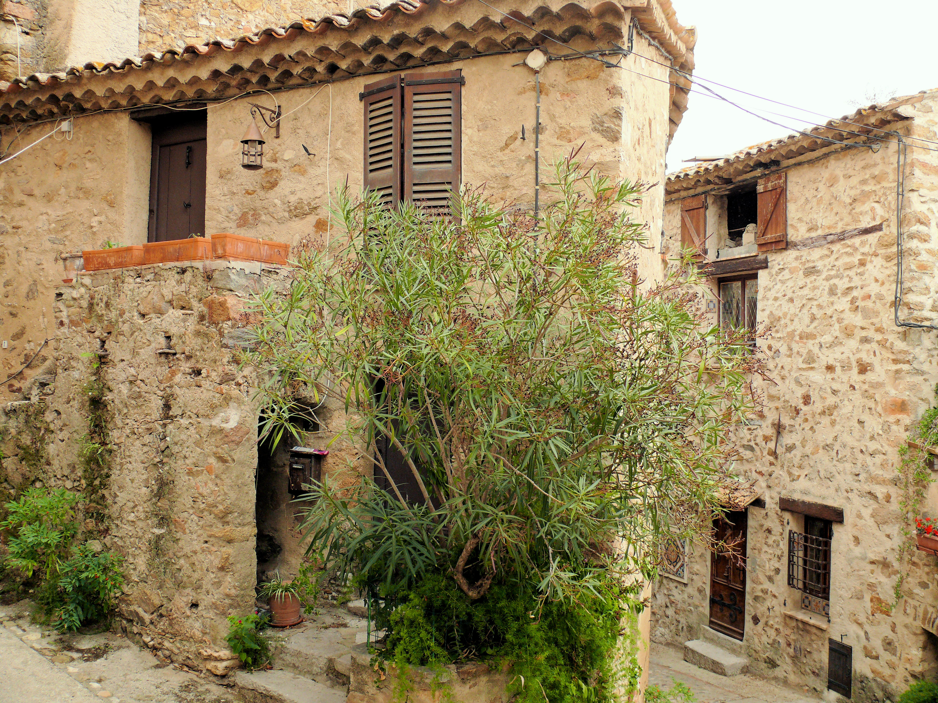 Auribeau-sur-Siagne - Vieux village - Ruelles